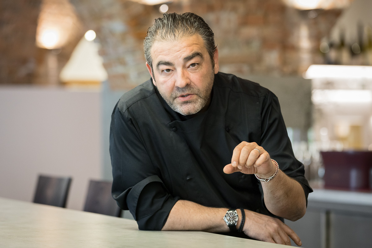 Sternekoch Juan Amador in seinem Restaurant Amador in Wien.